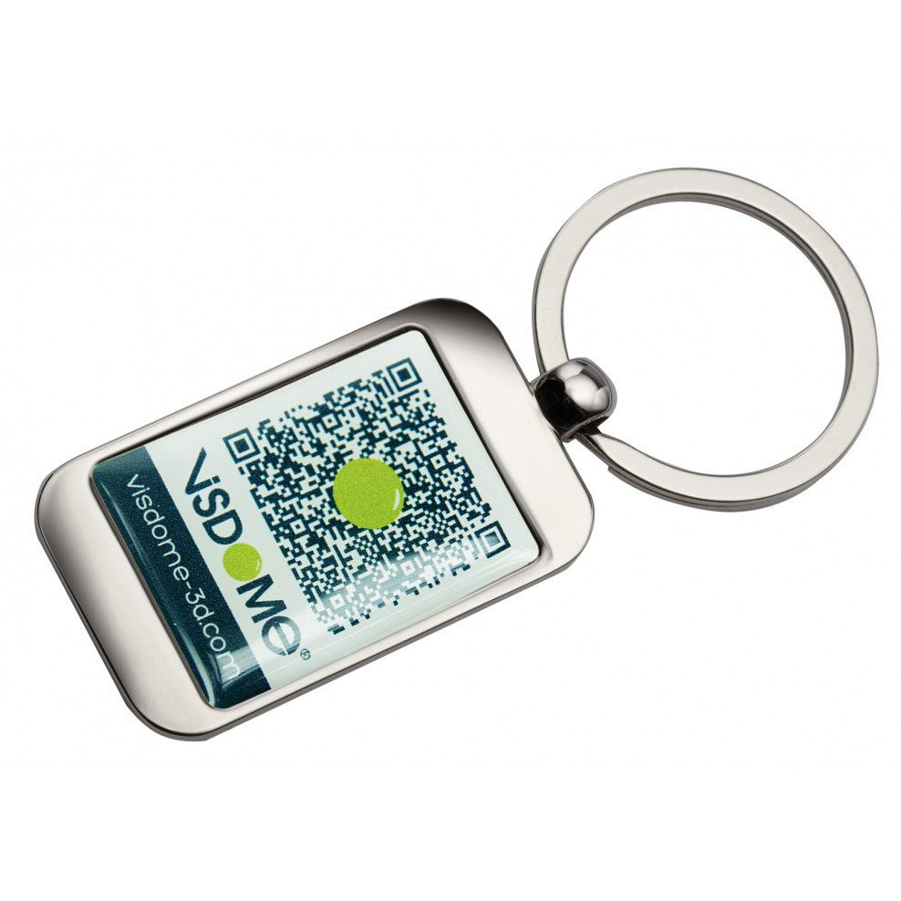 Gegenstände werden auch mittels Domingaufkleber gekennzeichnet